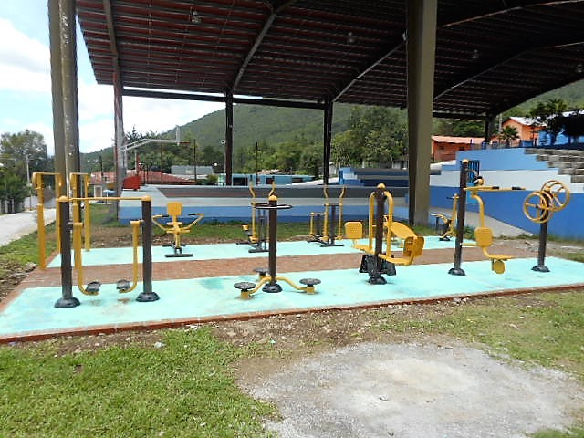 Gimnacio al aire libre de San Juan Achiutla, Oaxaca, México, instalado en junio de 2017